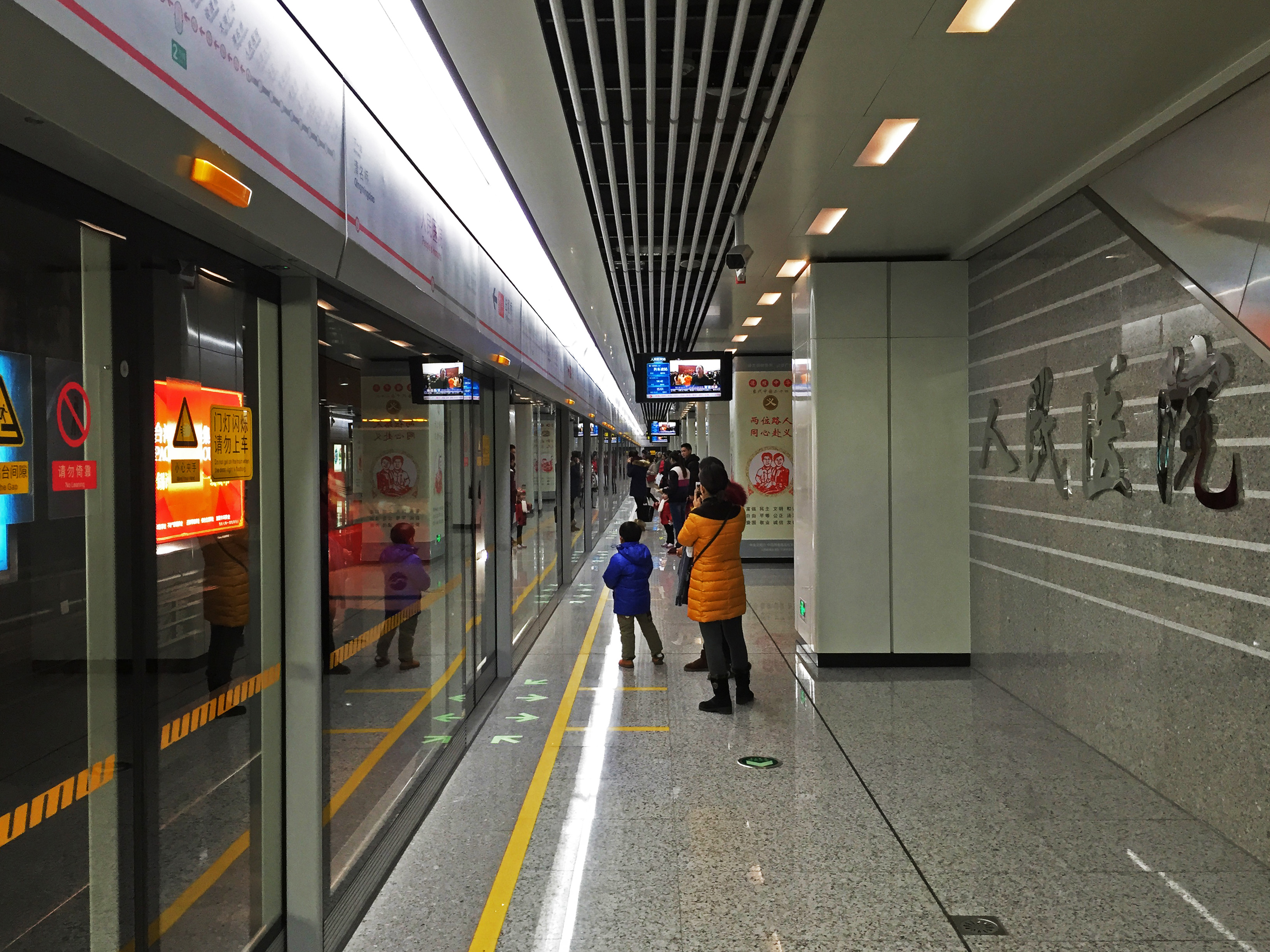 無錫地鐵人民醫院站站臺